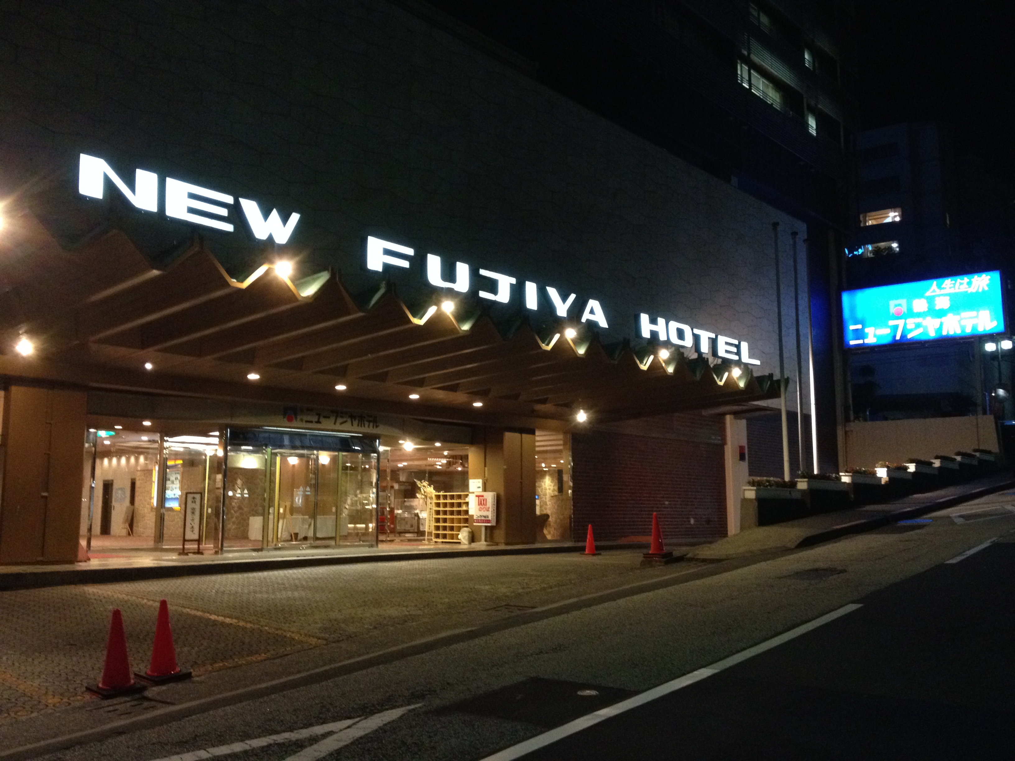 ニューフジヤの入り口